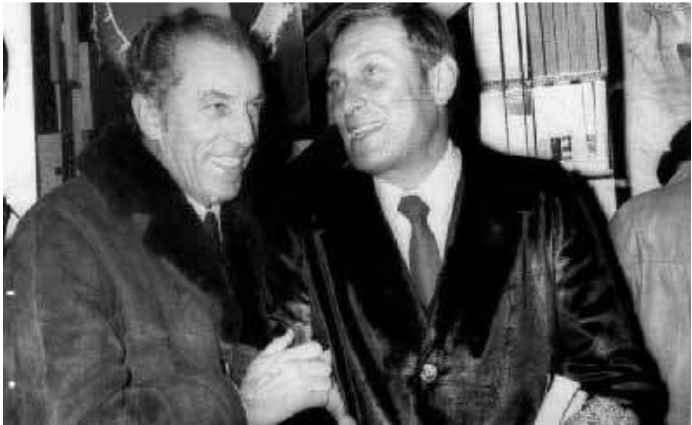 Giuseppe Berto and Francesco Grisi, Italian writers